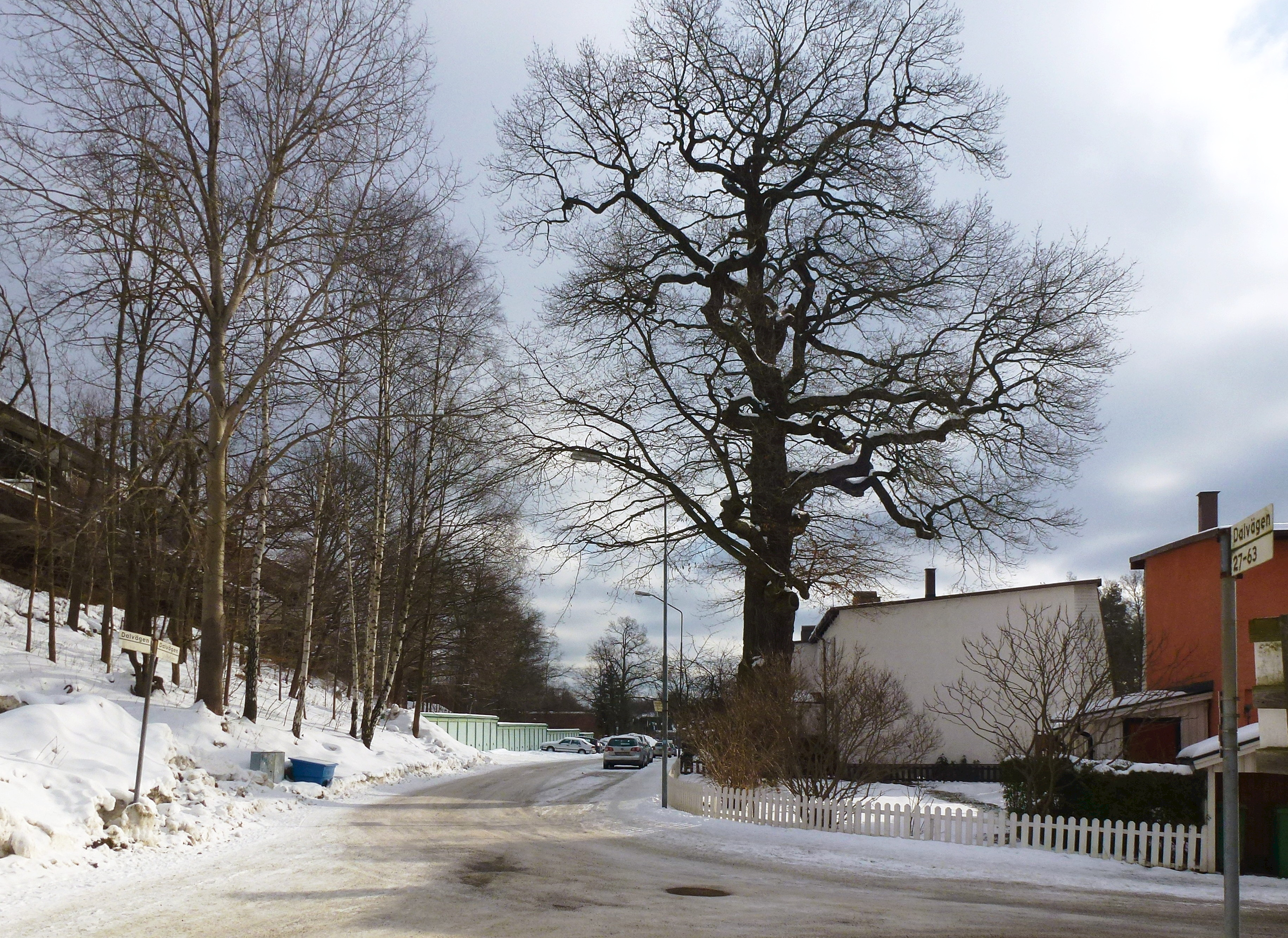 Dalvägen Segeltorp, platsen för Segeltorps gård (riven 1964). Eken är ett av Huddinges naturminnen